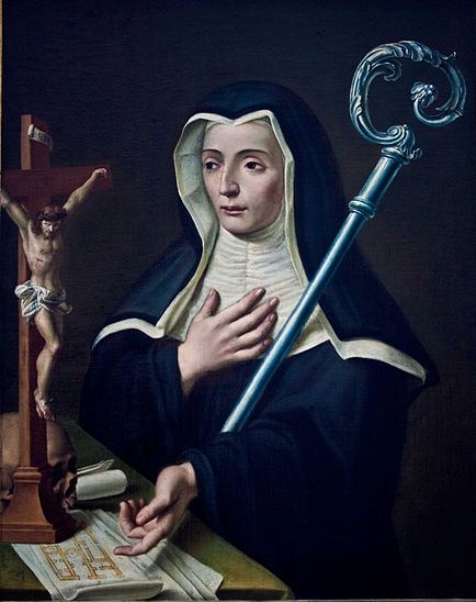 (Gubbio, circa 1250 – Roma 21 maggio 1305)